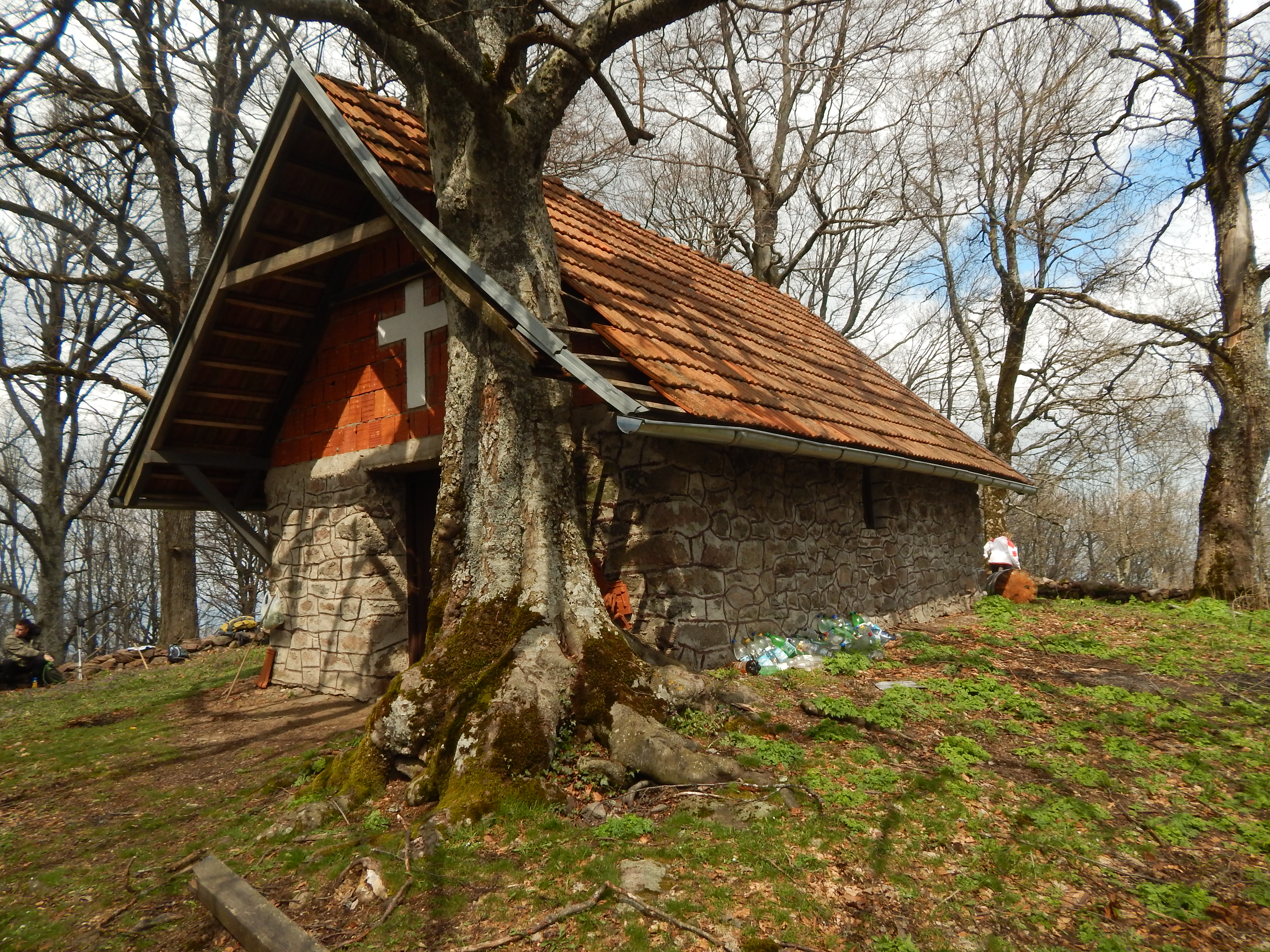 Предео изузетних одлика Радан